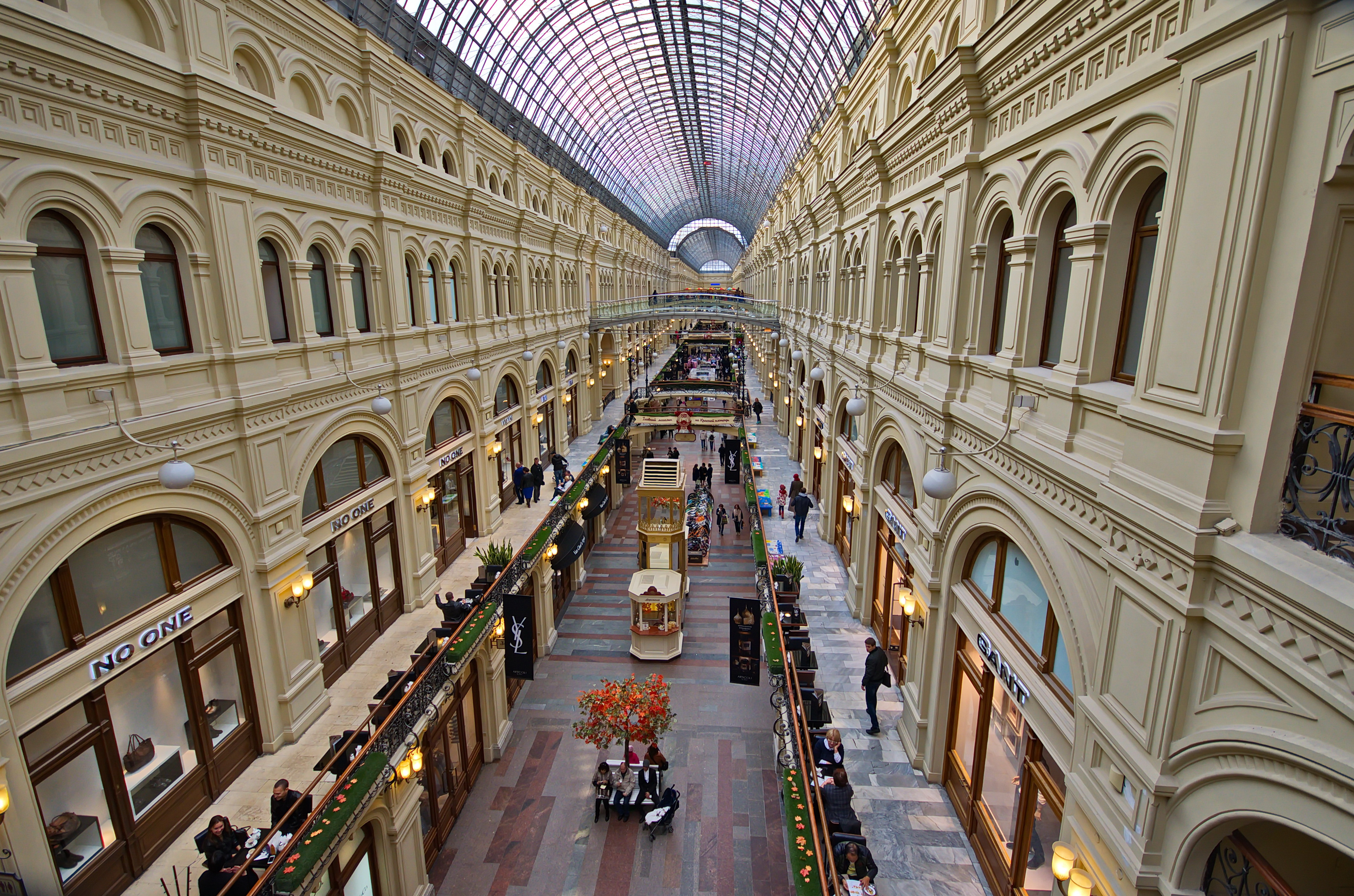 0285 - Moskau 2015 - Kaufhaus GUM